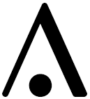 Fermata (triangle shape)